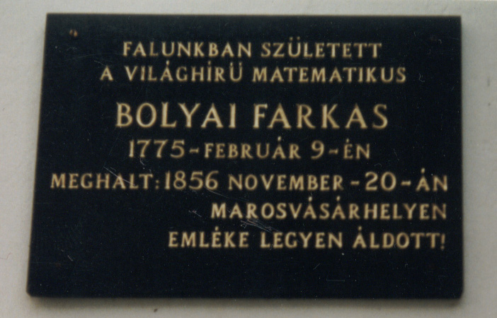 Bolyai Farkas-emléktábla Bólyában, a plébánia falán (Szeben megye, Erdély)